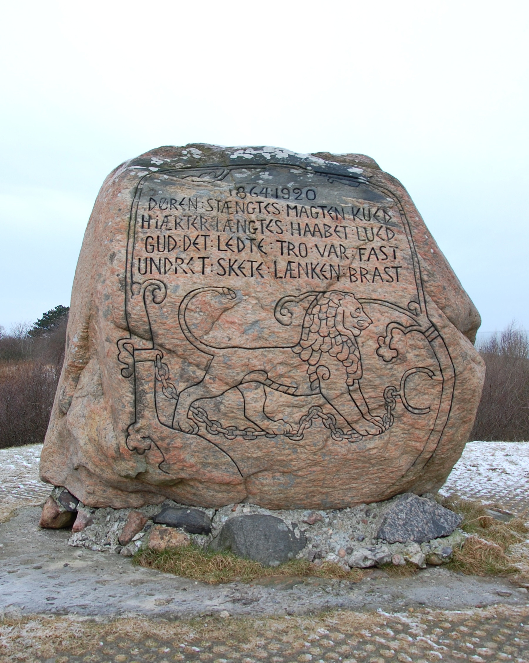 Esterhoj, Gedenkstein Vorderseite